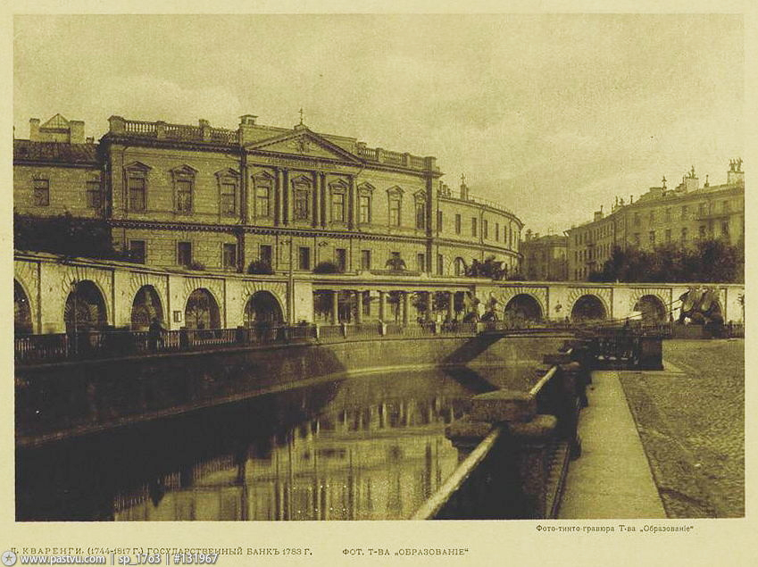 Здание Государственного банка, Санкт-Петербург, начало XX века.